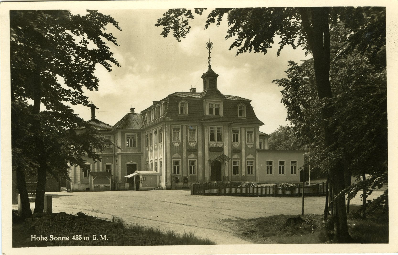 Ansichtskarte vom Hotel-Restaurant "Hohe Sonne" bei Eisenach.